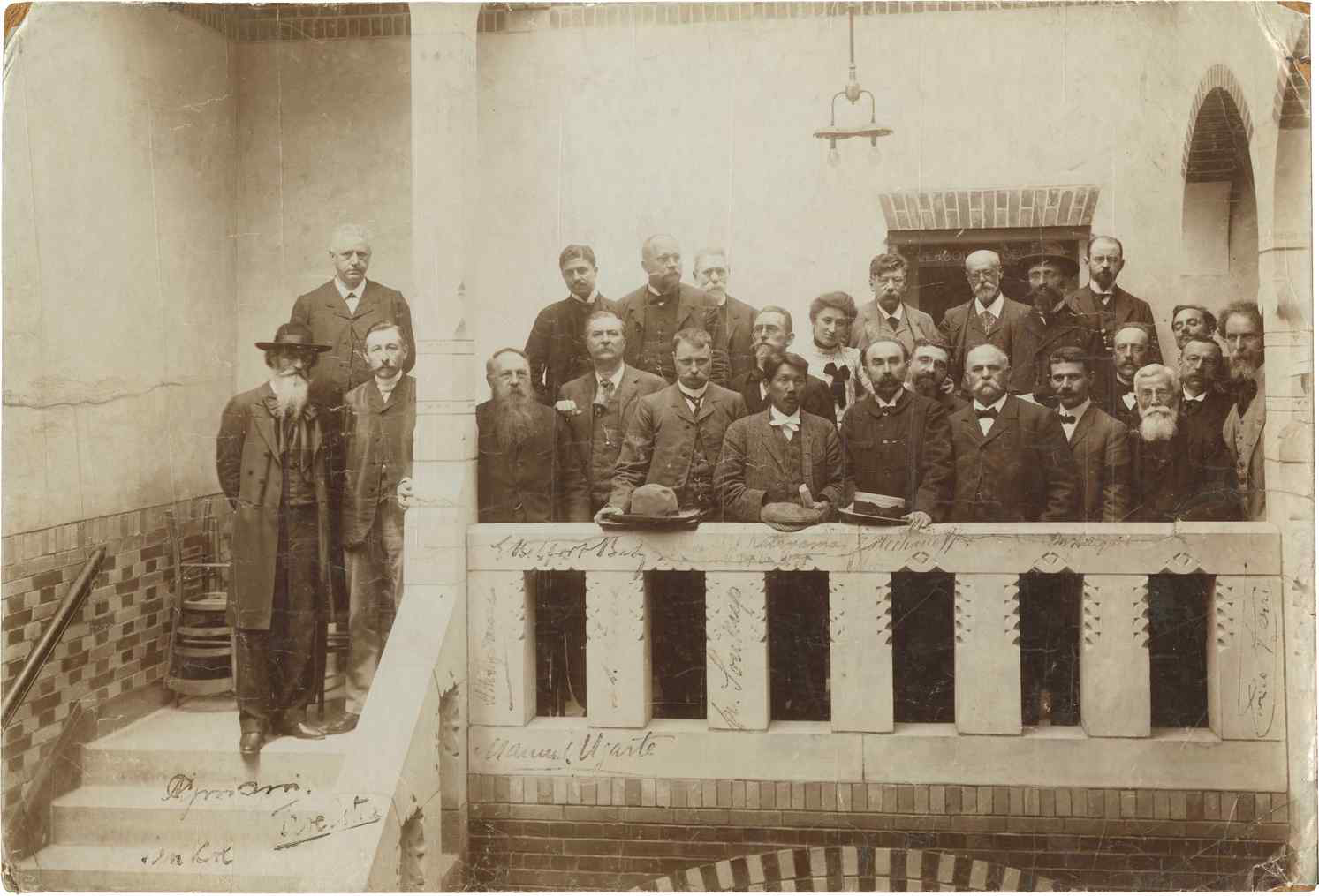 Delegados a la conferencia de Amsterdam de la Internacional Socialista en 1904. De izquierda a derecha, en primera fila: Cipriani, Toelstra, Hyndman, Berlfort Bax, Kringen, Katayama, Plejánov, Knudsen, Hillquit, Navroji, Anseele, y Ferri. En la segunda fila: Van Jol, Ugarte, Nemec, Vaillant, Soucup, Rosa Luxemburgo, Adler, Bracke, Kautsky, Walecki, Vandervelde, Cambier y Longuet.